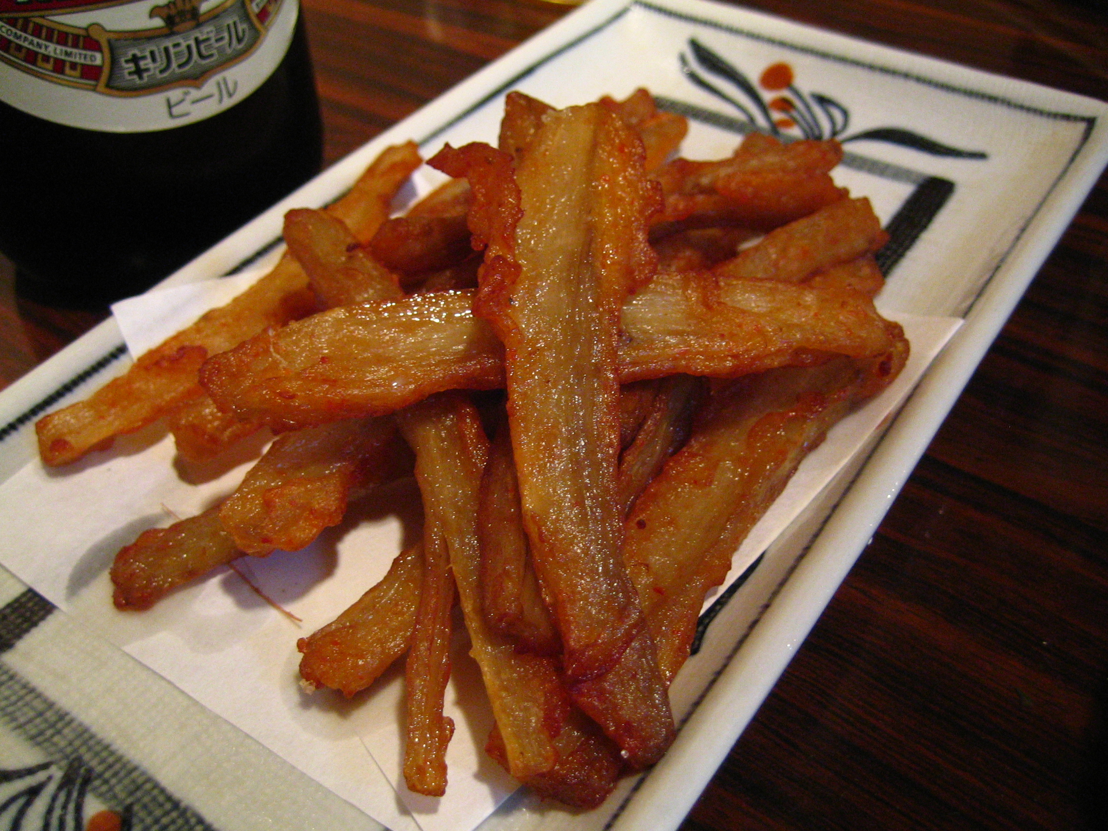 at Umi-no-Sachi, Monzen-nakacho, Tokyo